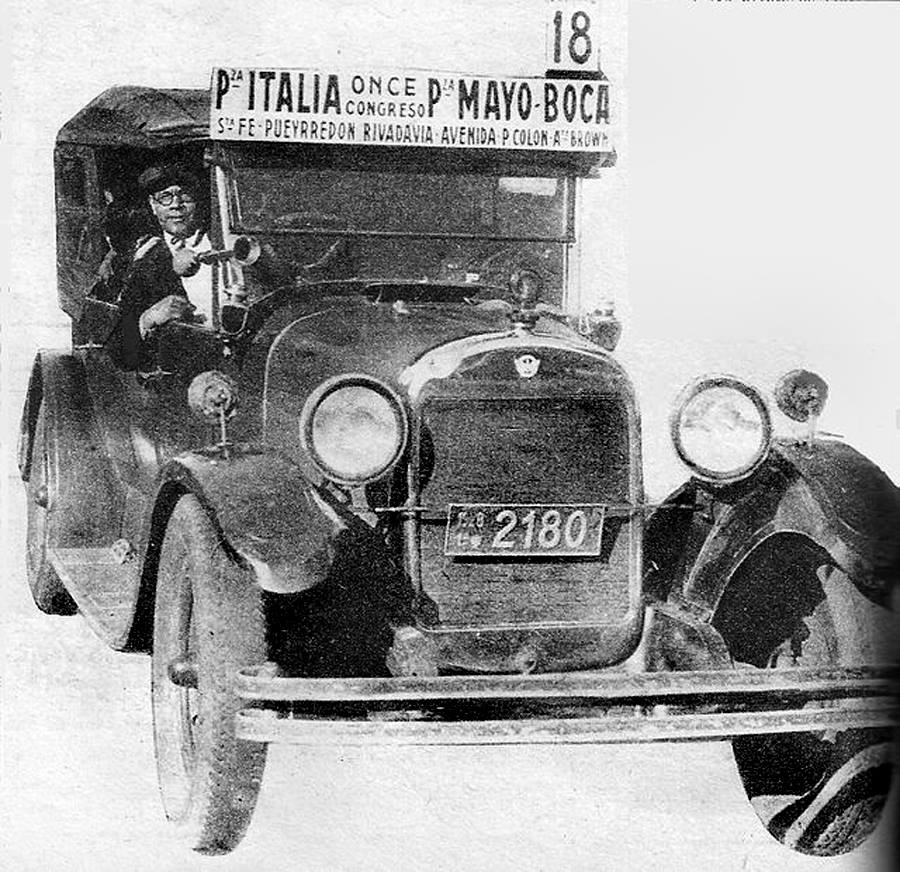 Auto-colectivo, línea 18, 1930 (circa). Recorrido de Plaza Italia a Boca Colectivos de Buenos Aires, Argentina. This file, was provided to Wikimedia Commons thanks to an agreement between the General Archive of the Nation of Argentina and Wikimedia Argentina.